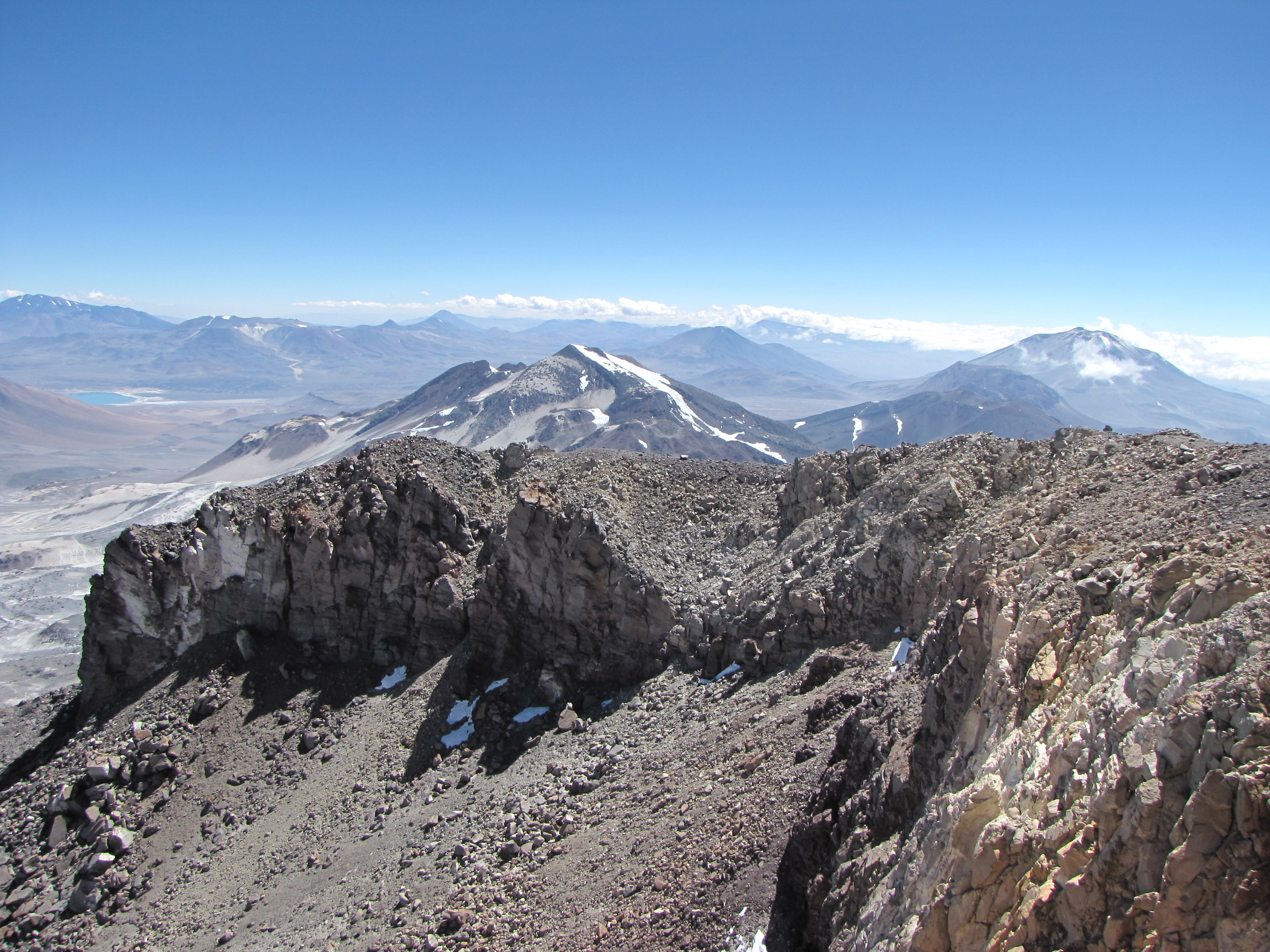 Ojos del Salado summit - the crater